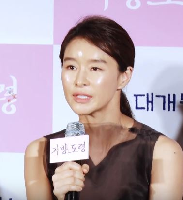 14일 오전 서울 중구 메가박스 동대문에서 열린 영화 '기방도령' 제작보고회